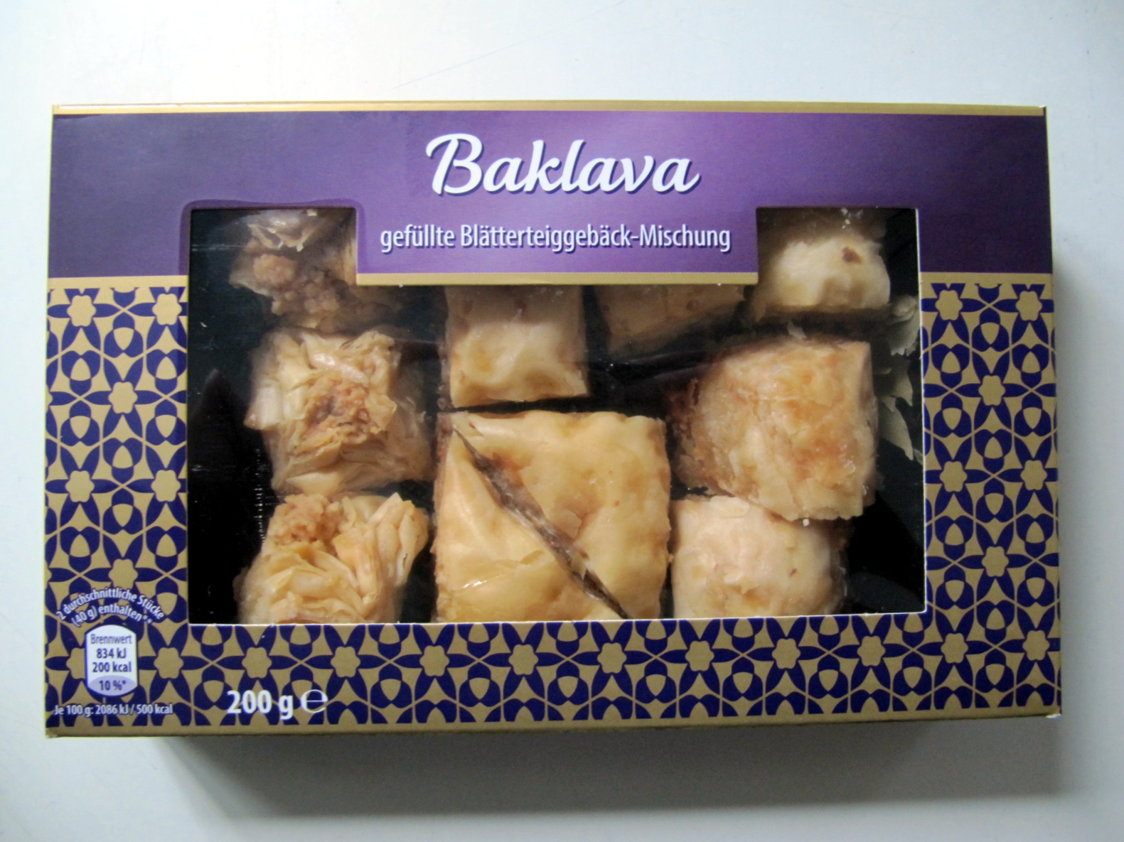 Baklava aus dem Discounter in Norddeutschland (Juli 2016).